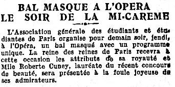 Annonce d'un bal masqué à l'Opéra le jour de la Mi-Carême 1927, avec couronnement de la Reine des Reines.